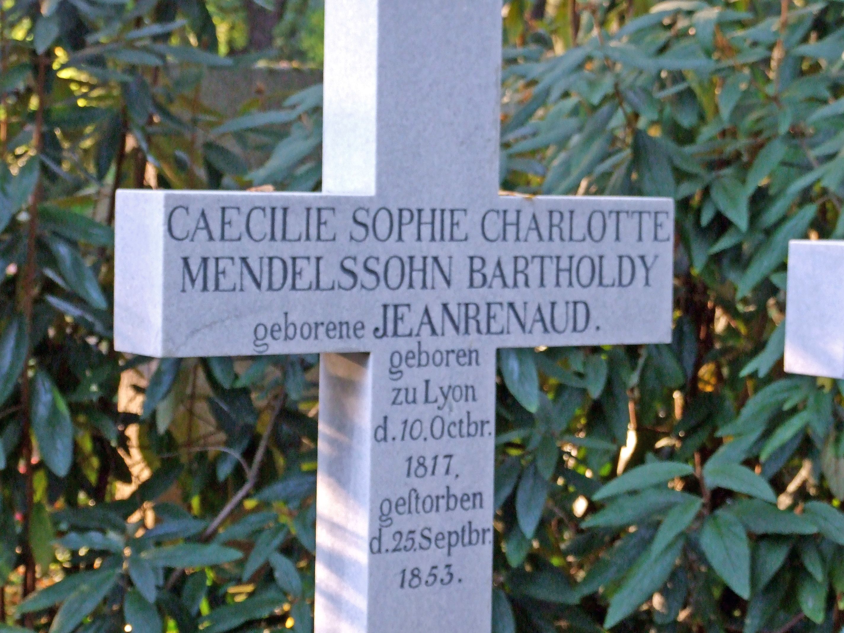 Caecilie Sophie Charlotte Mendelssohn-Bartholdys Grabmal, auf der Familien-Grabstelle auf dem Hauptfriedhof in Ffm